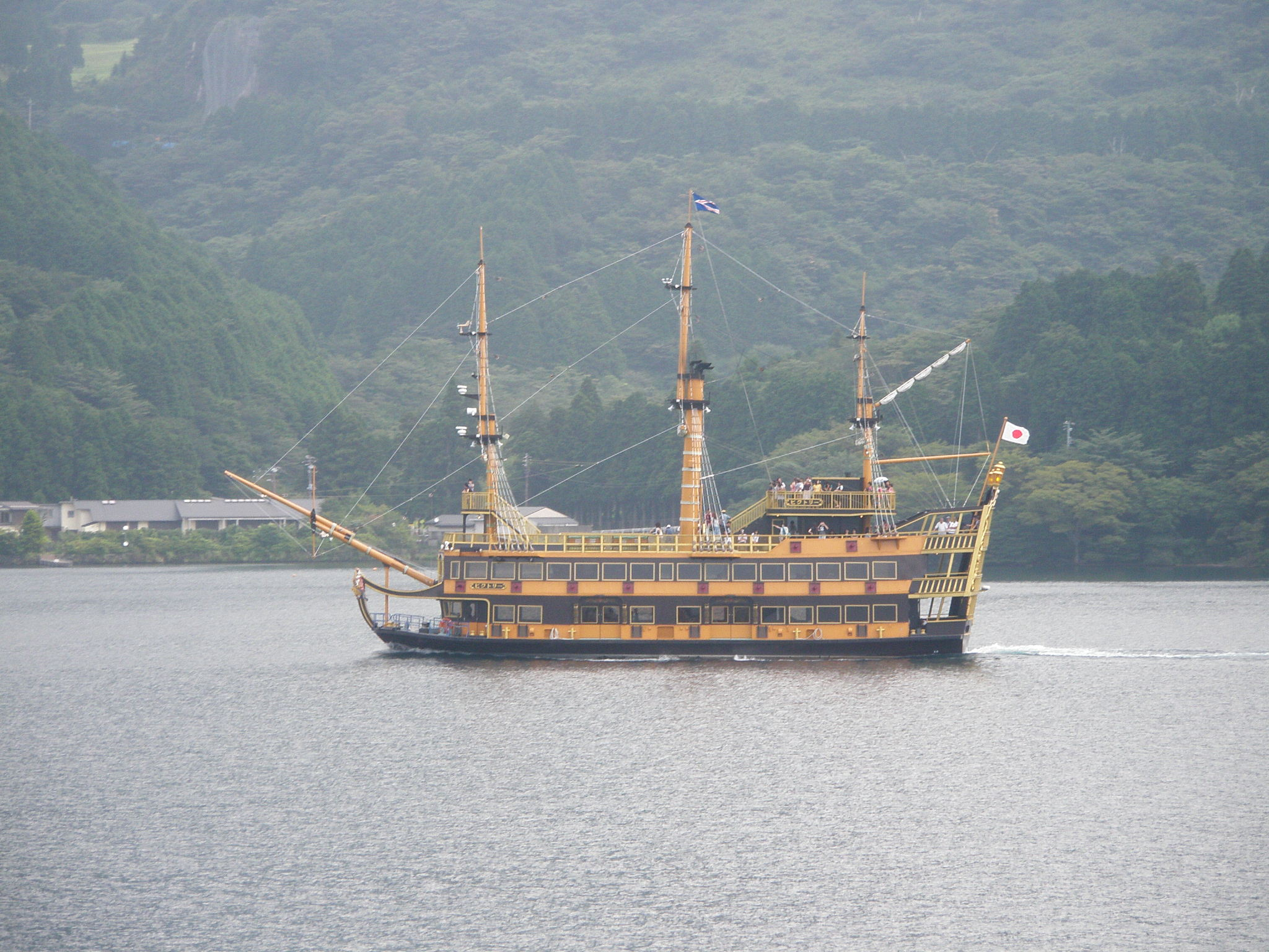 箱根海賊船ビクトリー号、芦ノ湖湖上にて